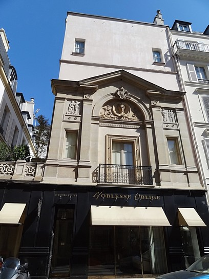 Atelier de Gustave Doré 27 Rue de Bellechasse VIIe arrondissement de Paris : Bâti vers 1865. Gustave Doré était un illustrateur, graveur, peintre et sculpteur français (1832-1883). La façade comporte deux moulages de fragments de la frise Est est du Parthénon, (réalisée entre 445 et 438 avant J.-C.). Le moulage de la frise de gauche provient du British Museum, le moulage de droite du Musée du Louvre.